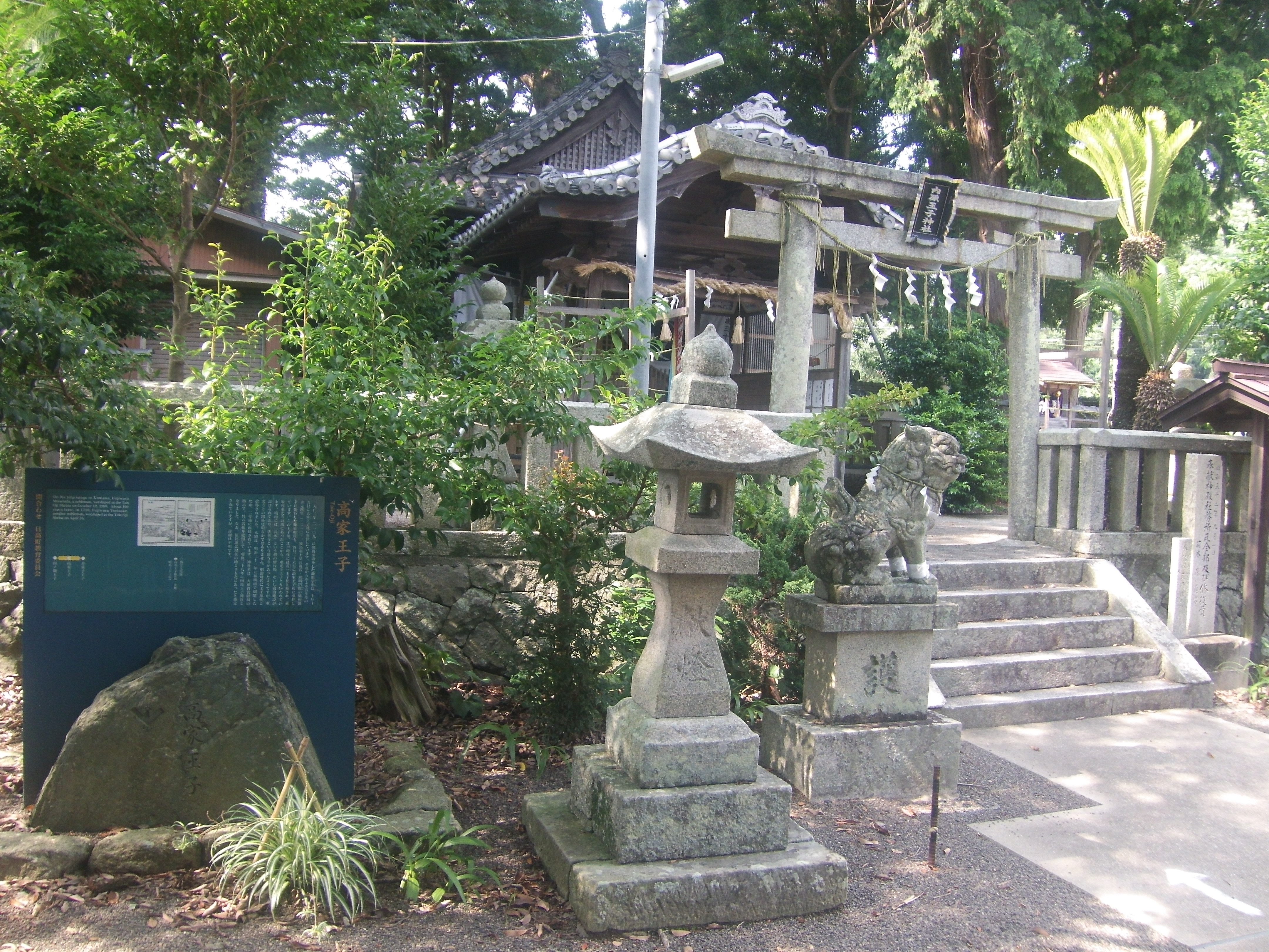 熊野古道・紀伊路の九十九王子の一つ高家(たいえ)王子を祀る内原王子神社(和歌山県日高町）